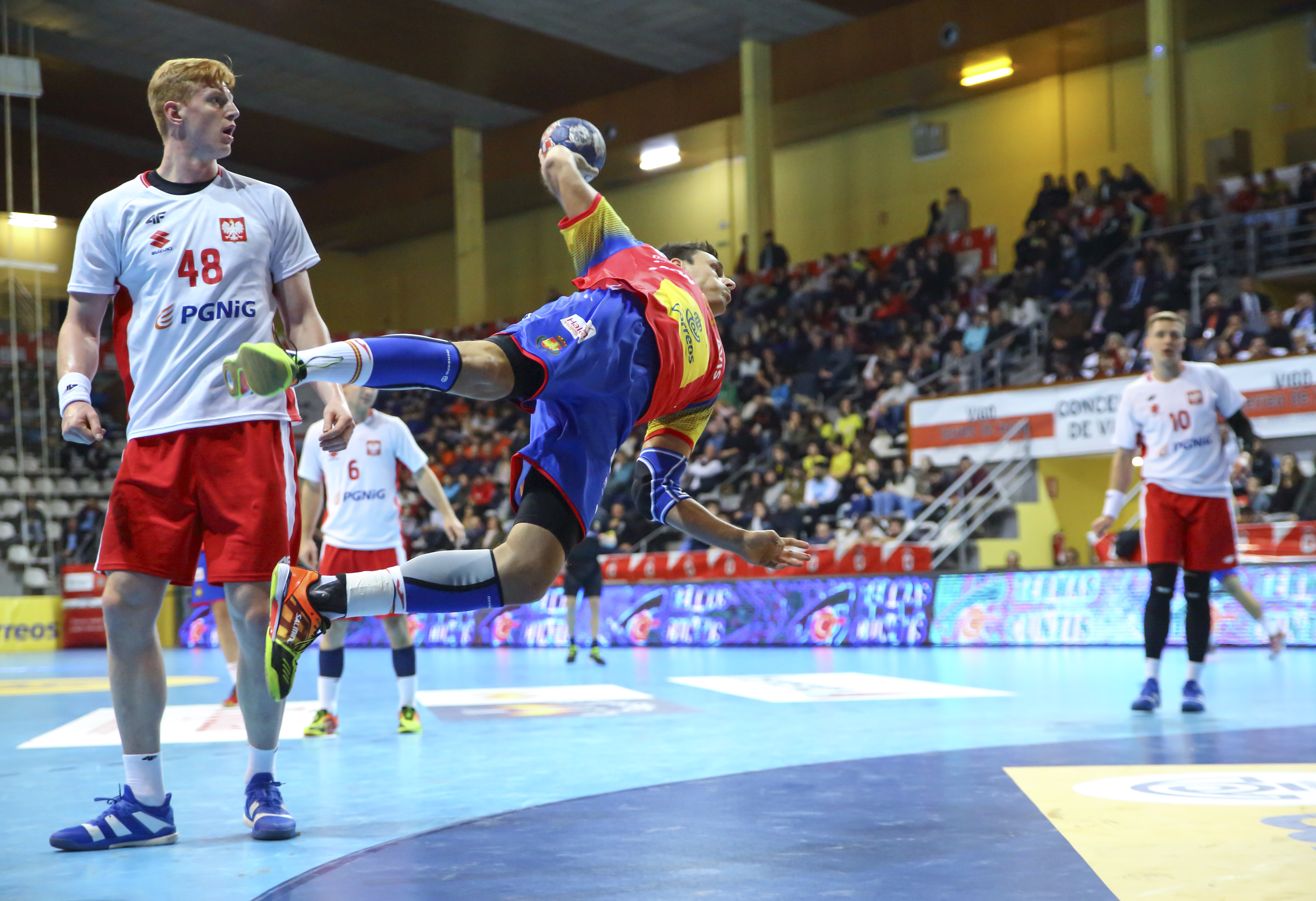 XLIII Torneo Internacional de España, disputado en Pontevedra y Vigo, para el último preparatorio de cara al Europeo, con la convocatorio ya definitiva.